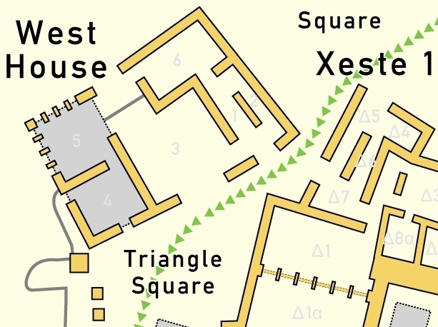 Genordete Lage des Westhauses in der Ausgrabungsstätte von Akrotiri auf Santorin, Griechenland